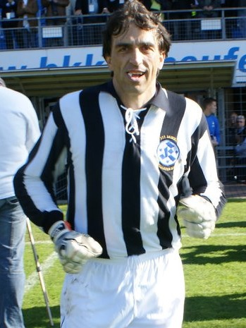 Claus Reitmaier 2010 bei einem Jubiläumsspiel der Stuttgarter Kickers